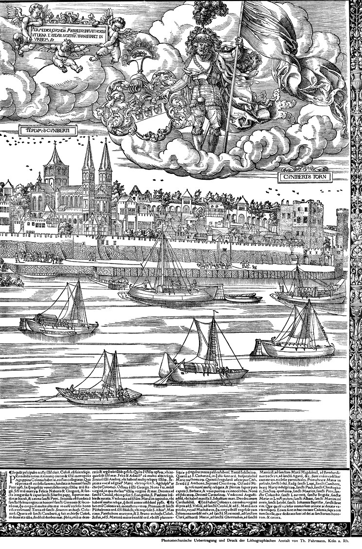 Holzschnitt: Woensam St. Kunibert, Kunibertstor und Thürmchen Blatt 9 (1531)